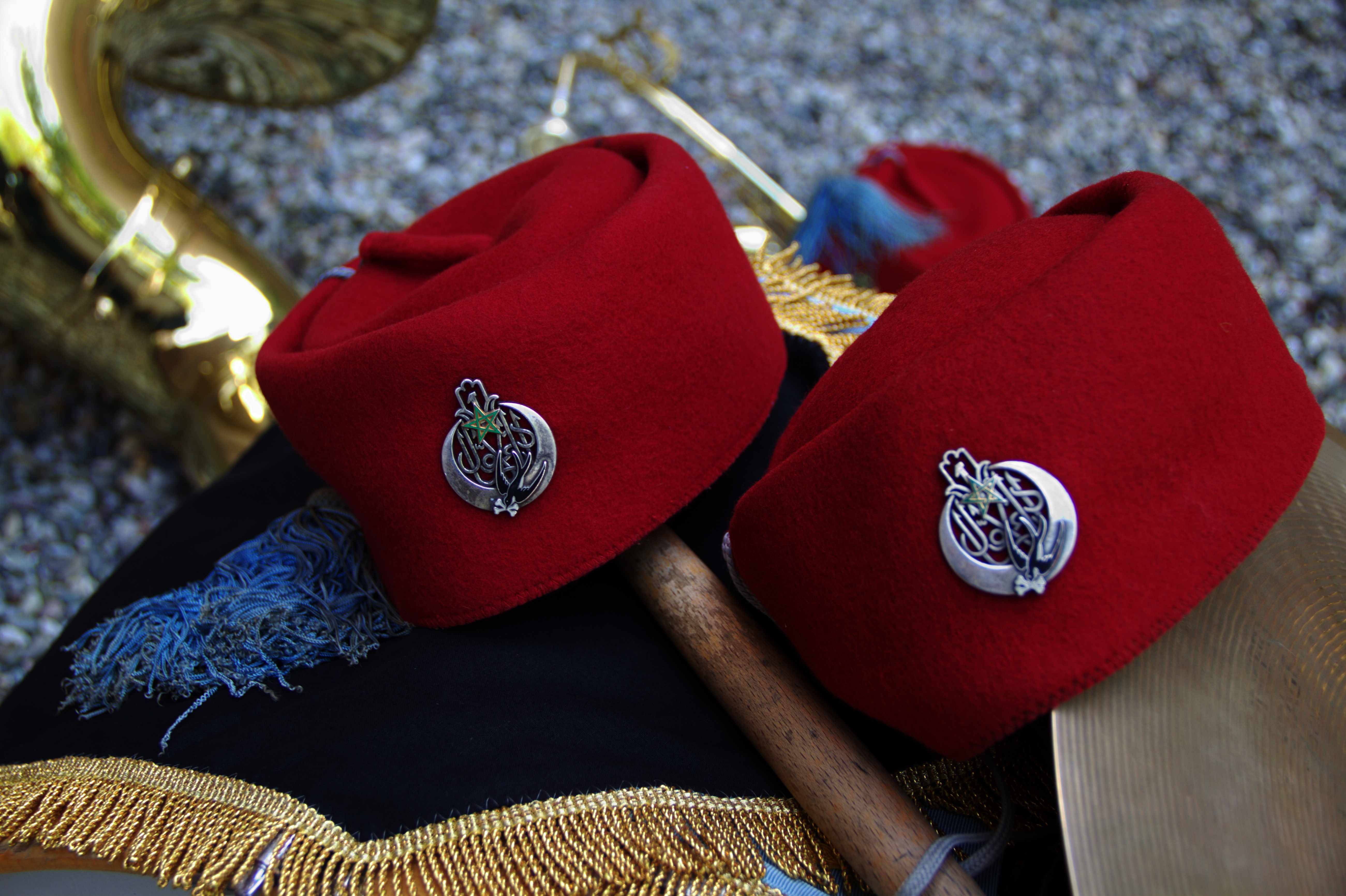 Cérémonie commémorative du 8-mai-1945 Strasbourg, place de la République 8 mai 2013